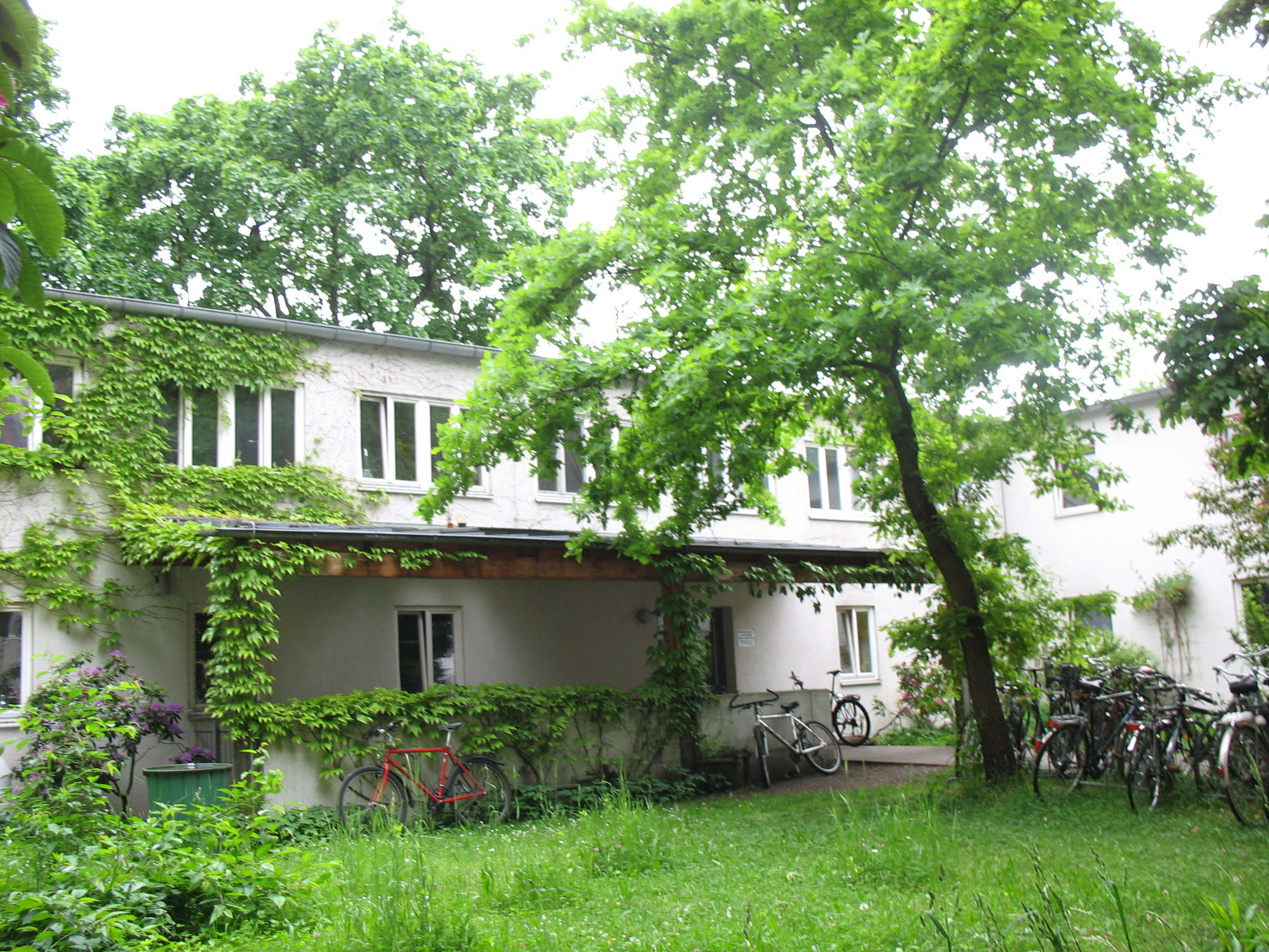 Eingangsbereich der Wohheimsiedlung Maßmannplatz